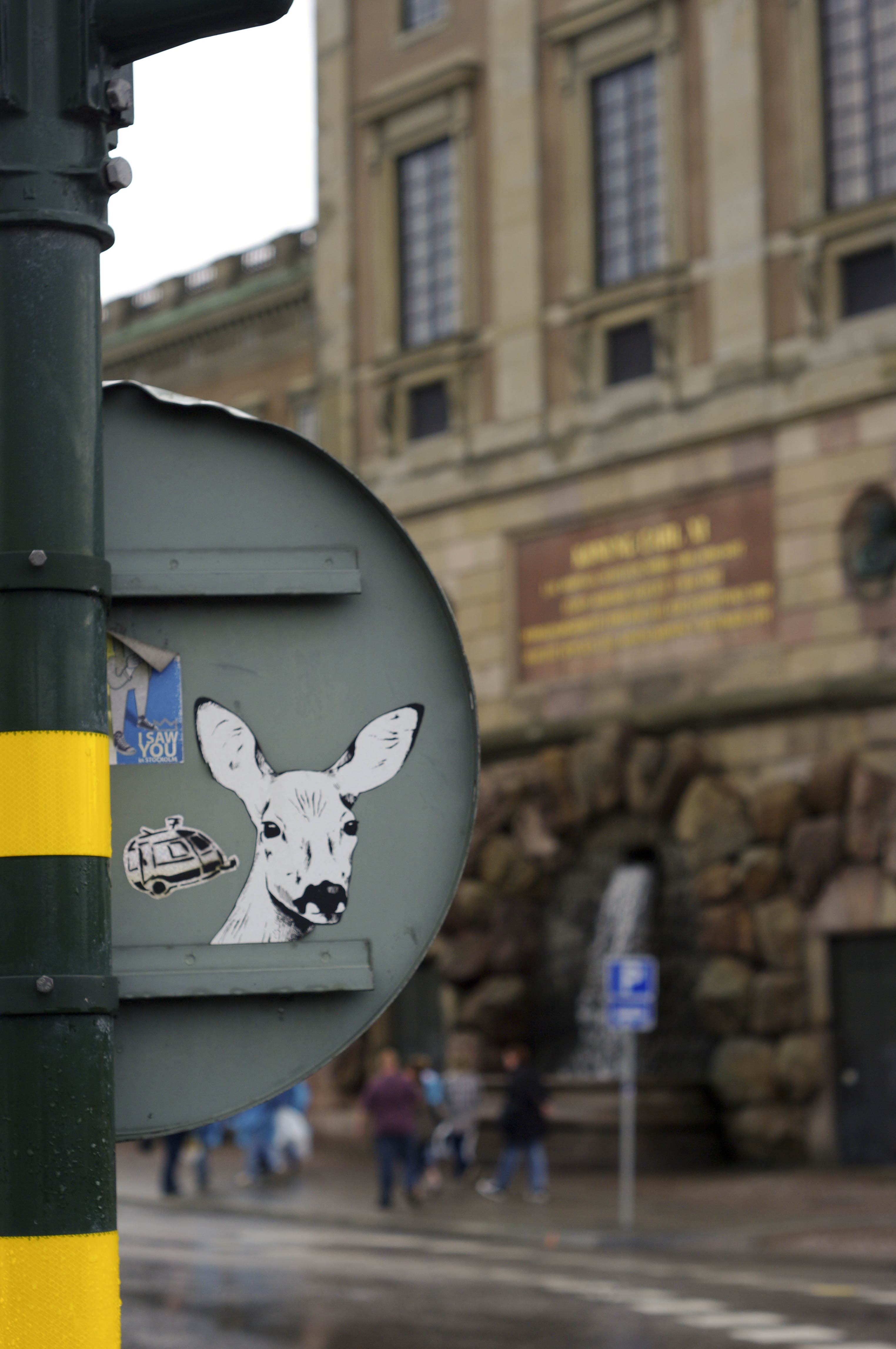 Street Artist = Klisterpeter